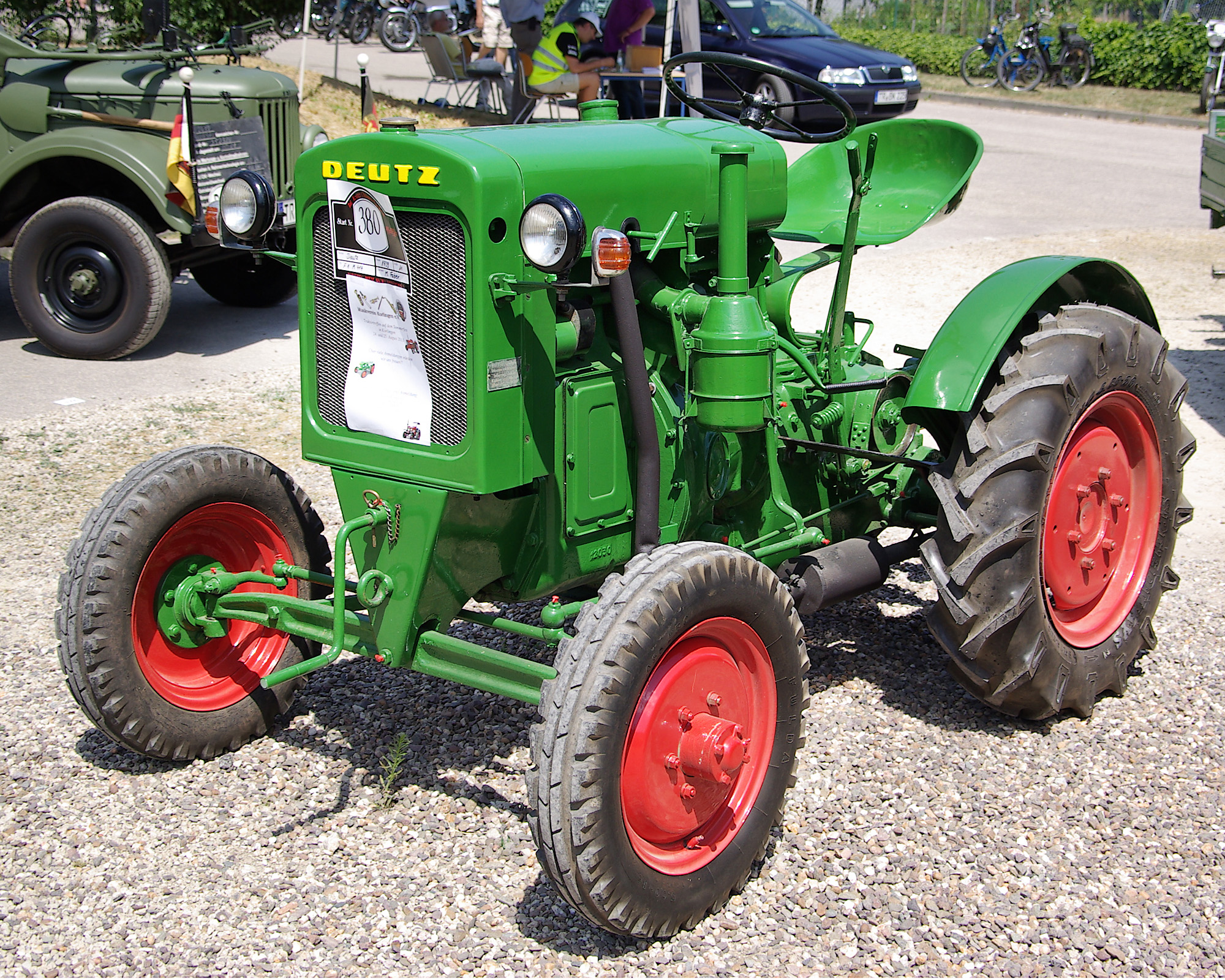 Deutz F1M 414, 1939,11 PS, 29. Internationales Oldtimer-Treffen, Konz